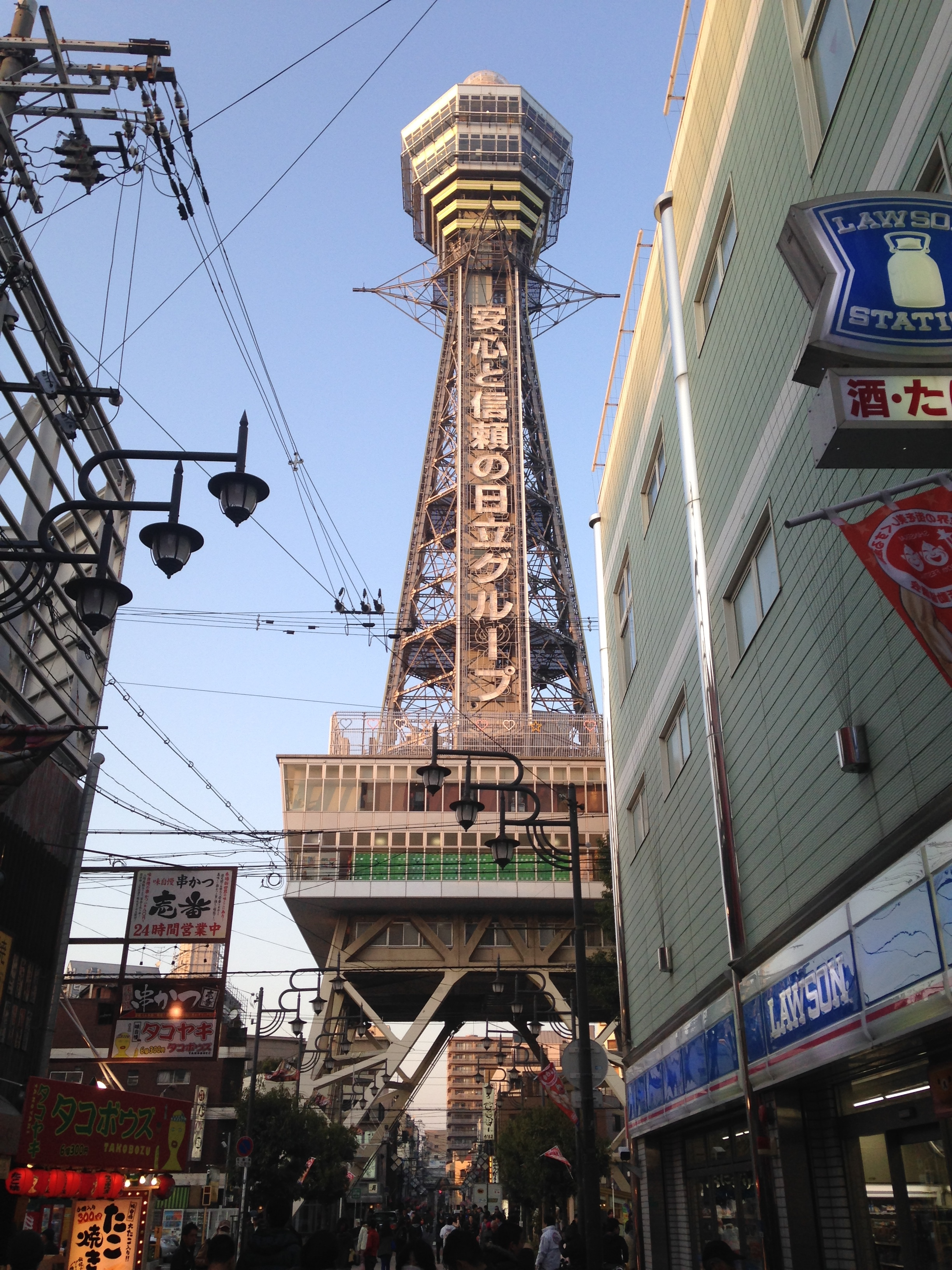 新世界・通天閣